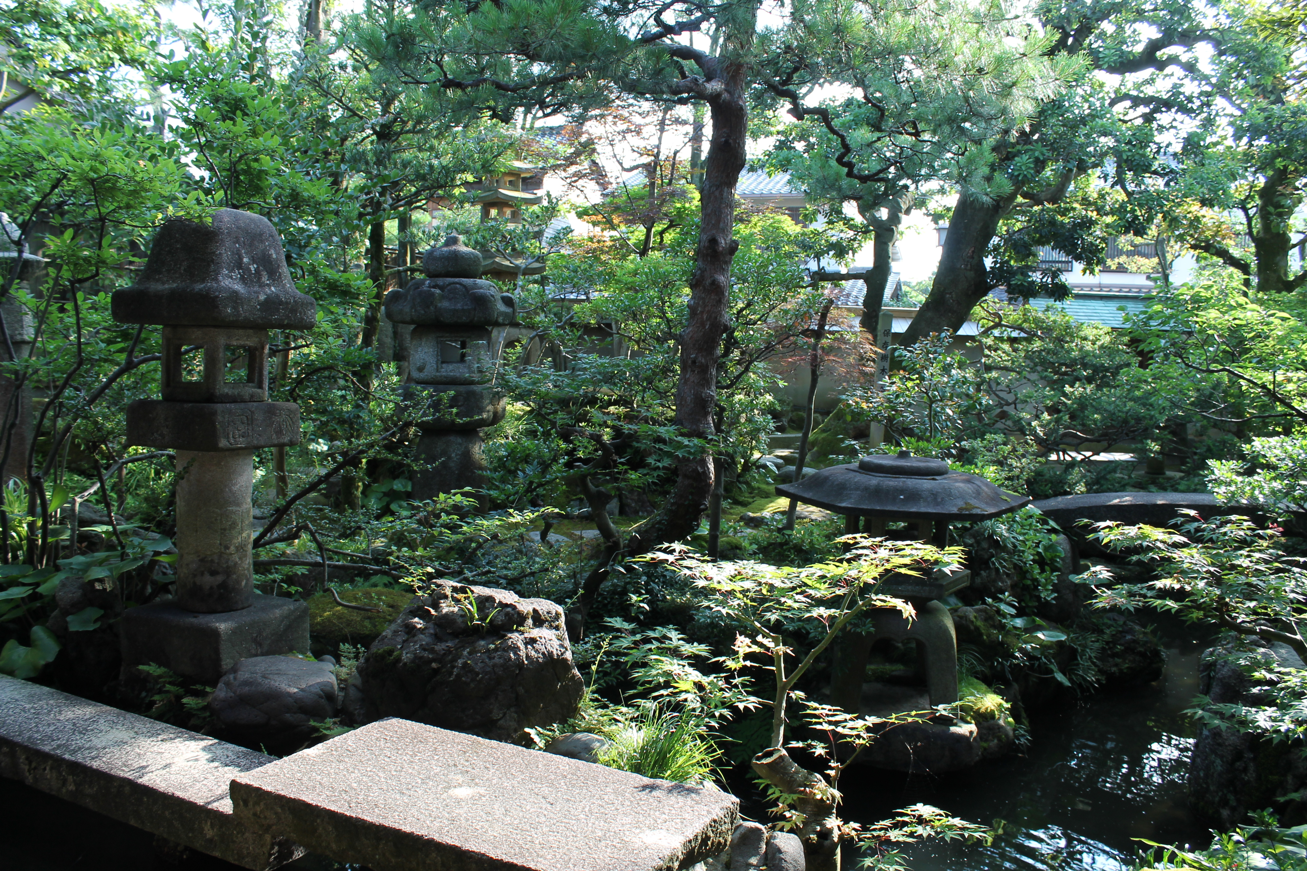 Японские традиционные фонари торо в самурайском доме в Канадзаве